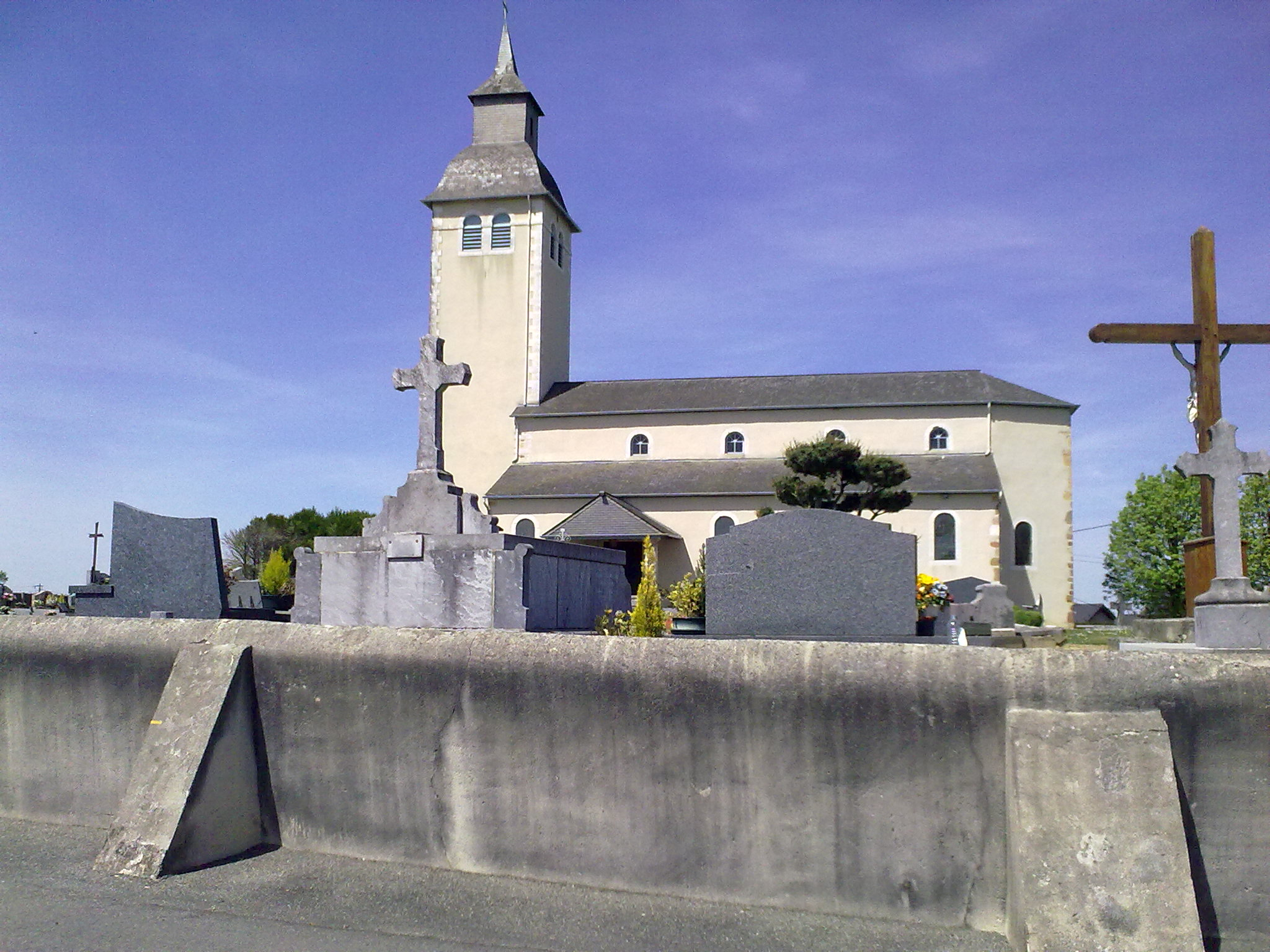 Andoins, France